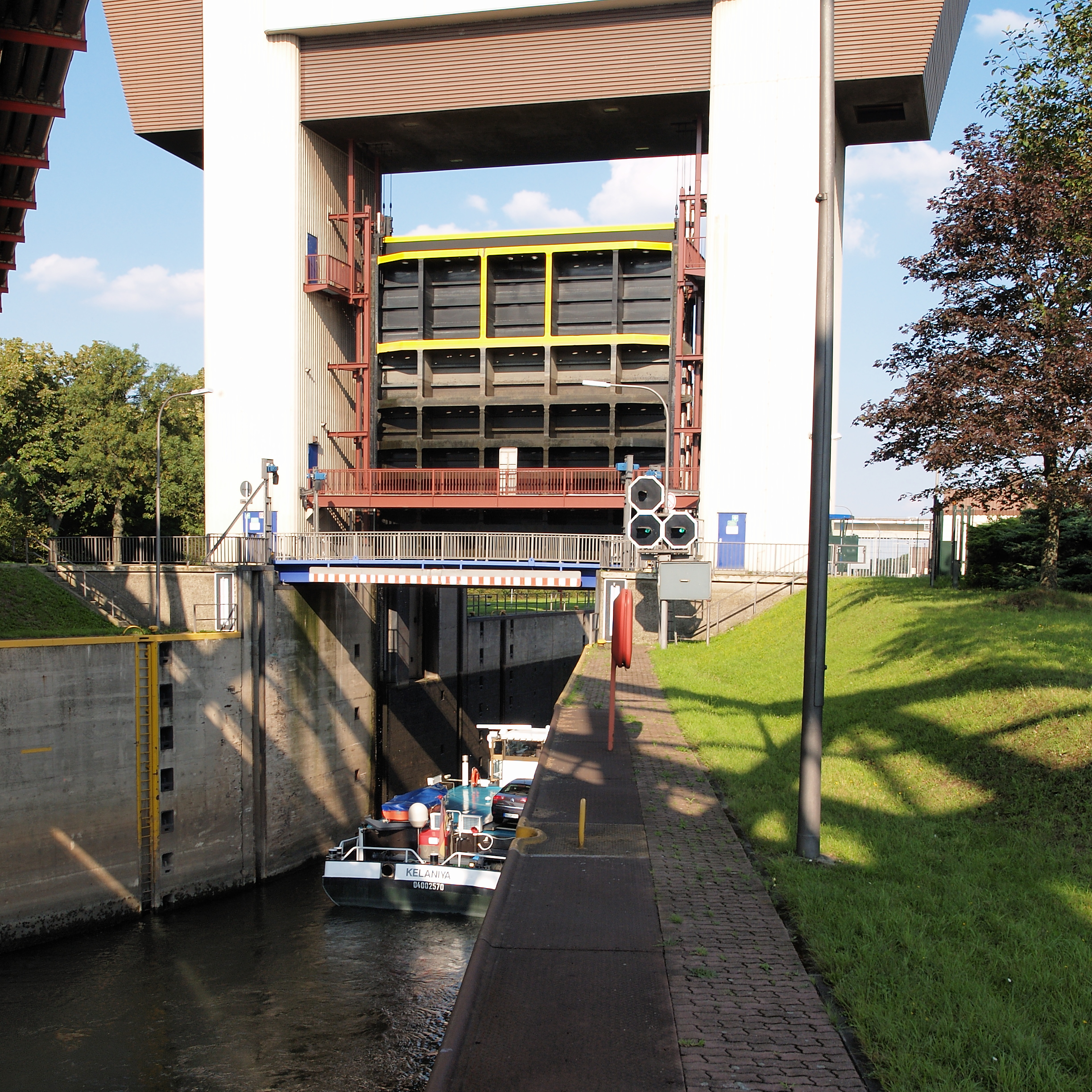 Unterhaupt der Schleuse Meiderich am Rhein-Herne-Kanal in Duisburg, mit geöffnetem Hubtor und einfahrendem Motorschiff